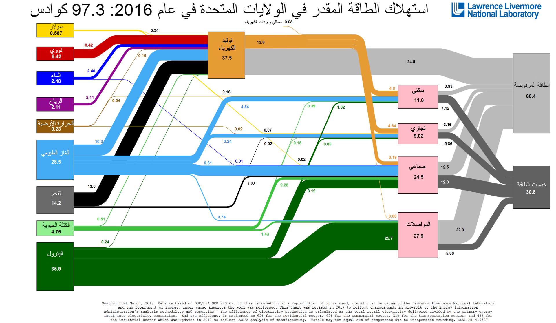 استهلاك الطاقة في الولايات المتحدة 2016